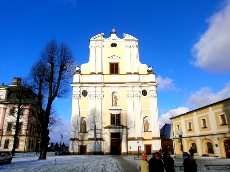 Krzeszów